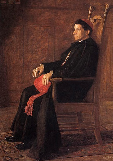 Kardinal Sebastian Martinelli (1848-1918) portraitiert von Thomas Eakins (1844-1916)